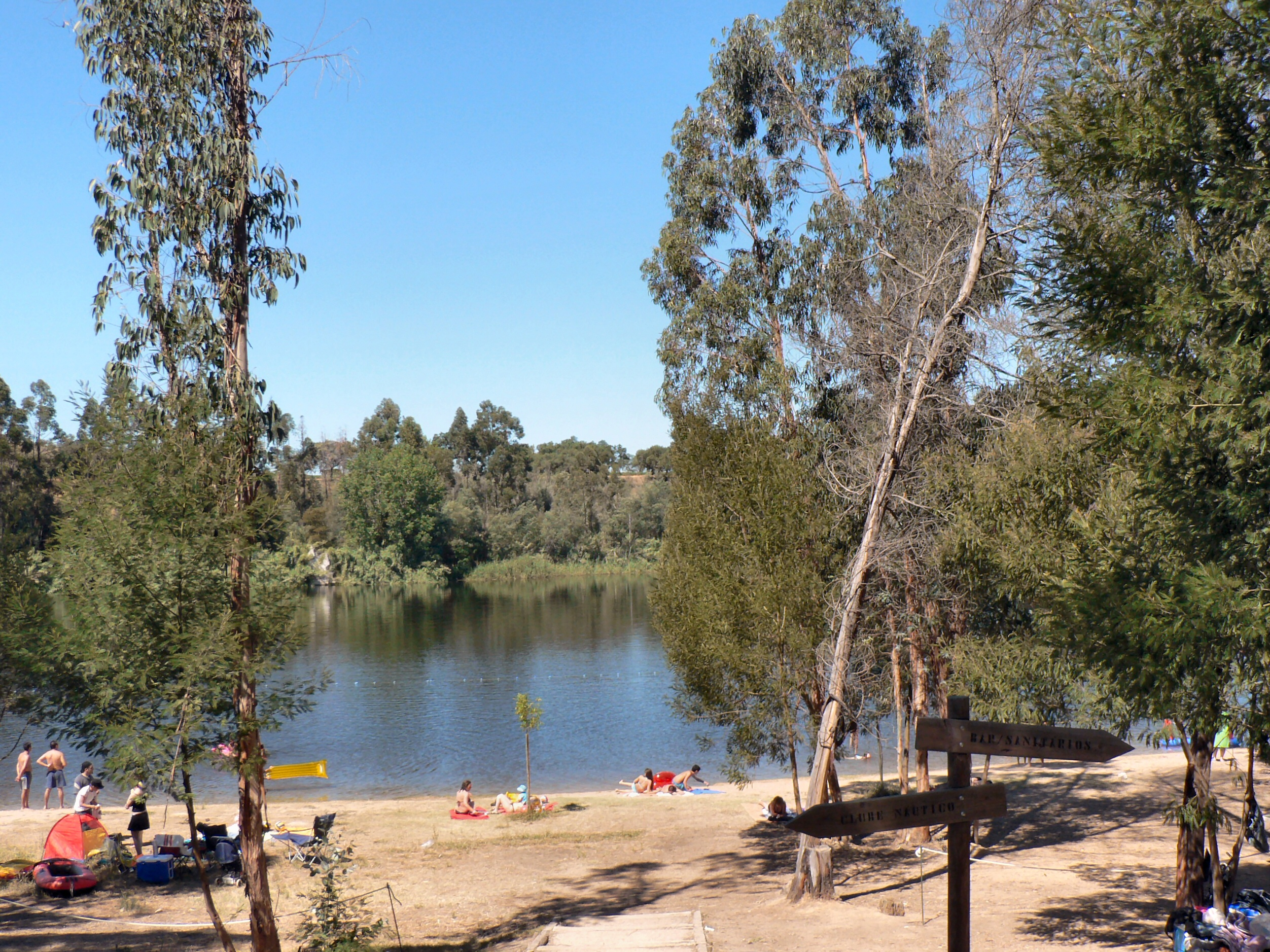 Vista do Parque Ecológico do Gameiro - Praia fluvial